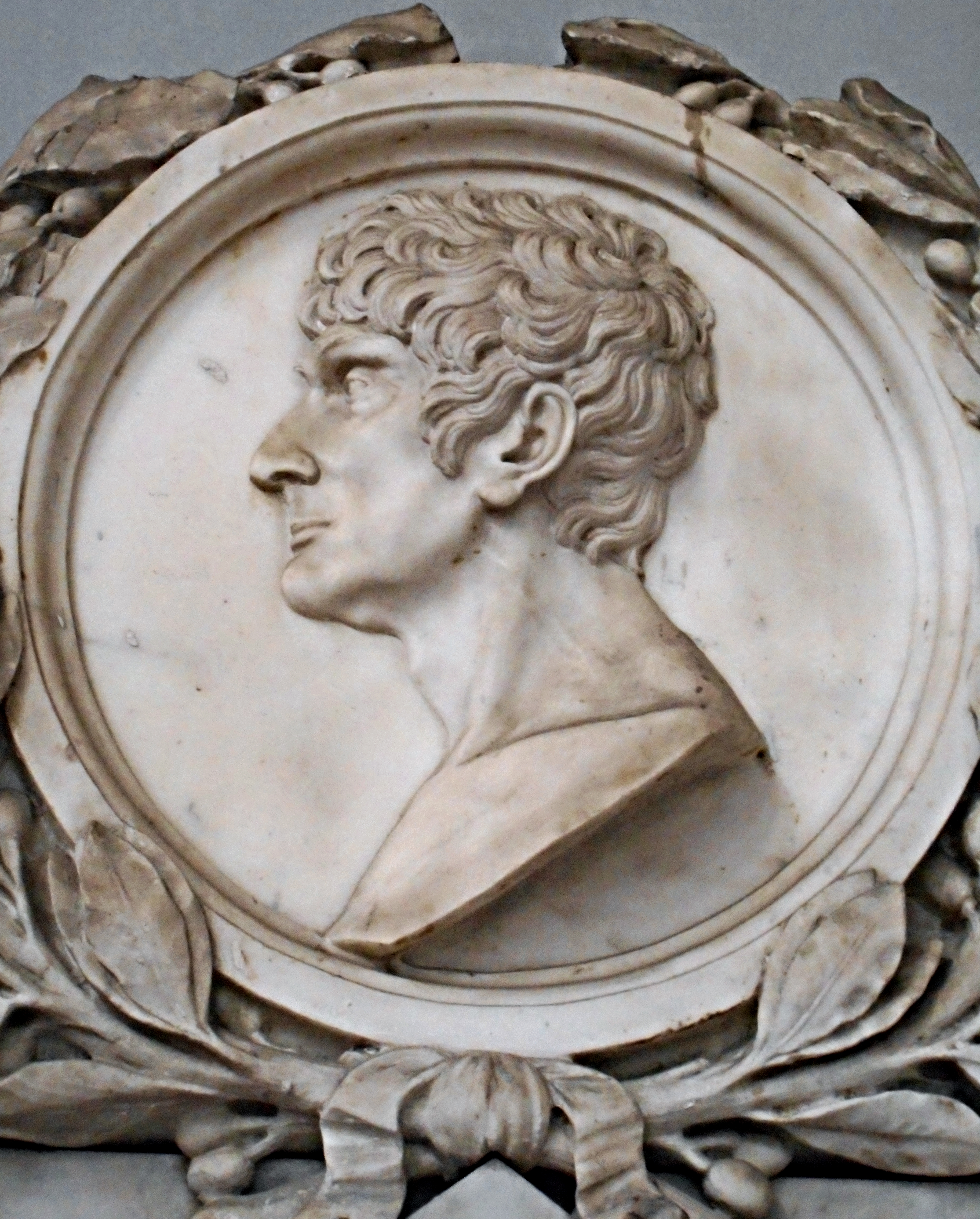 LISTENING: Ouverture from Nina pazza per amore by Giovanni Paisiello